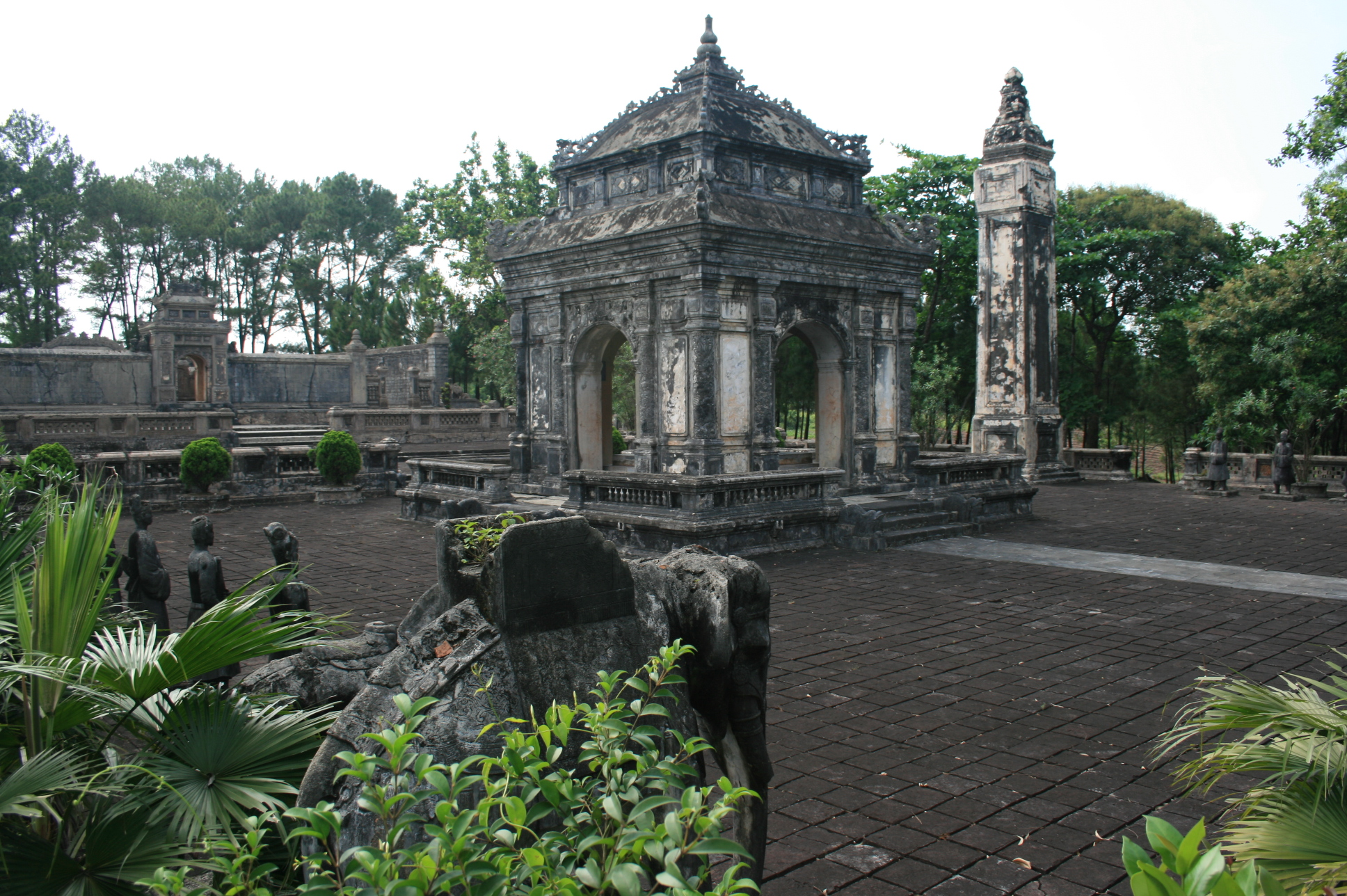 Tomb of DongKhanh (Nhà bia và khu lăng mộ vua Đồng Khánh)